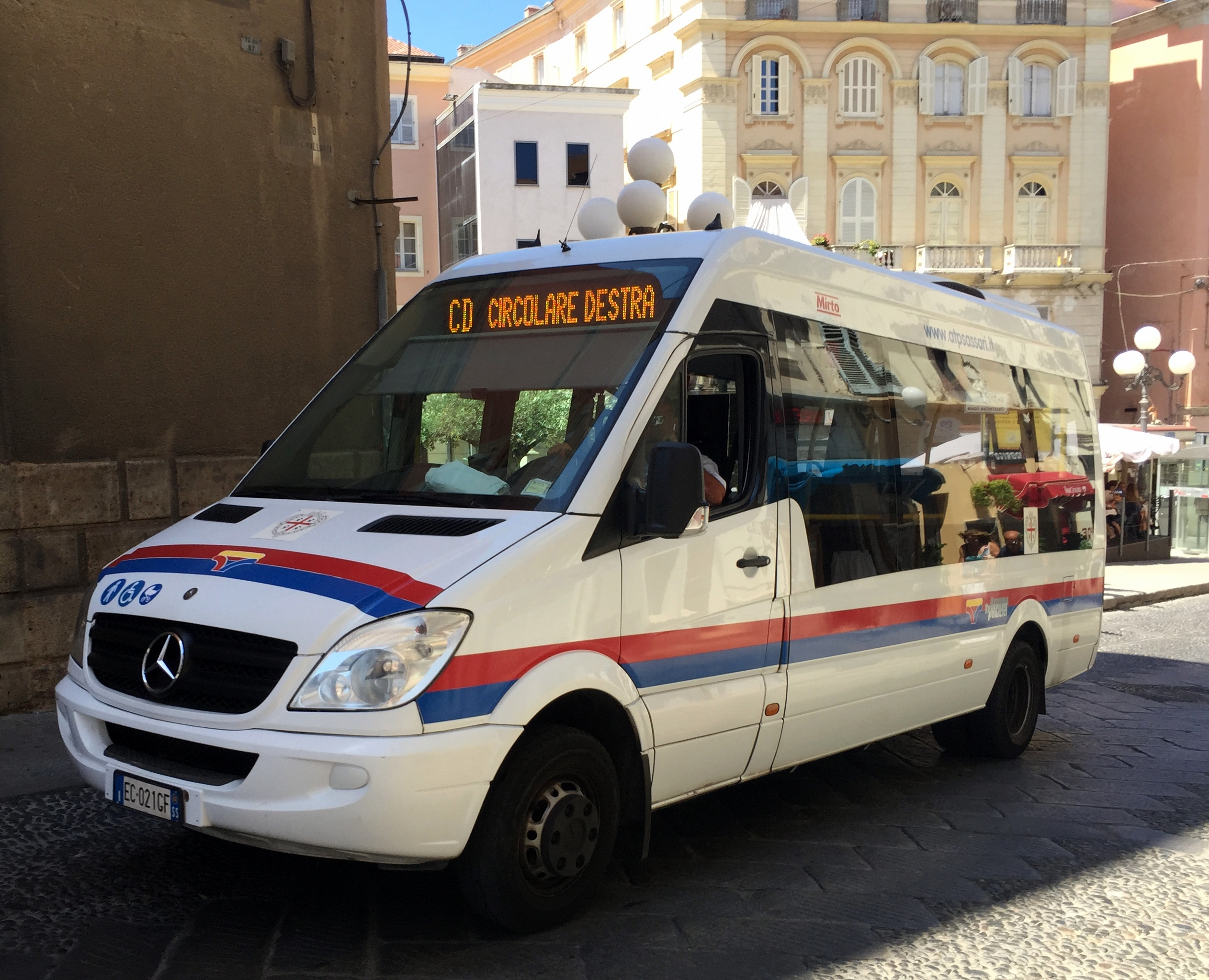 Image de Sassari, Sardaigne, juillet 2015.